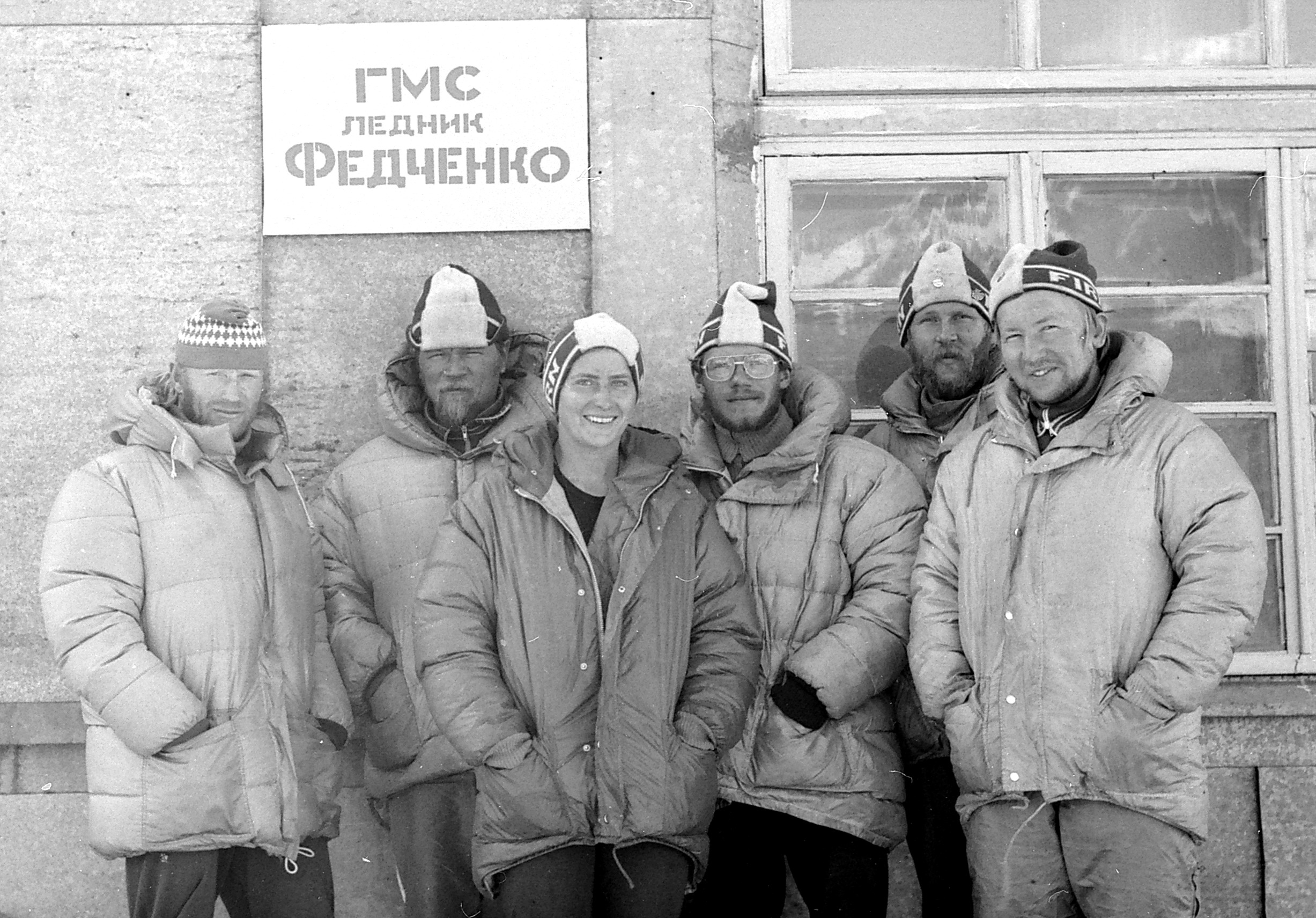 Ekspeditsioon mäetipule "Tartu Ülikool 350". Grupipilt.